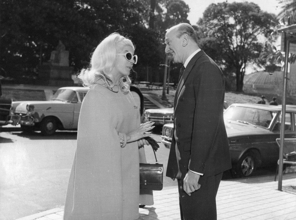 Libertad Leblanc y Héctor Méndez en la película Deliciosamente amoral.